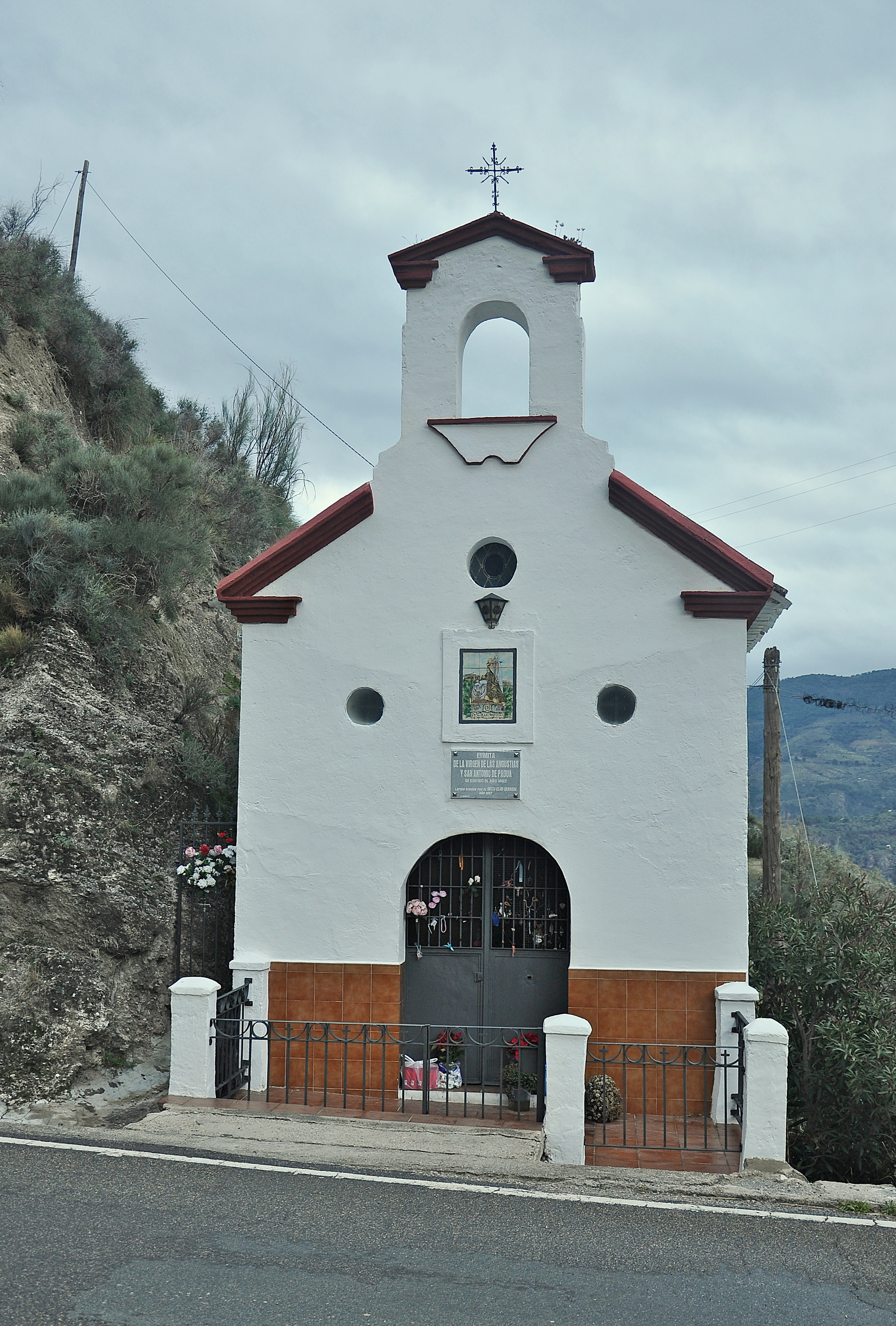 Alpujarra-2018